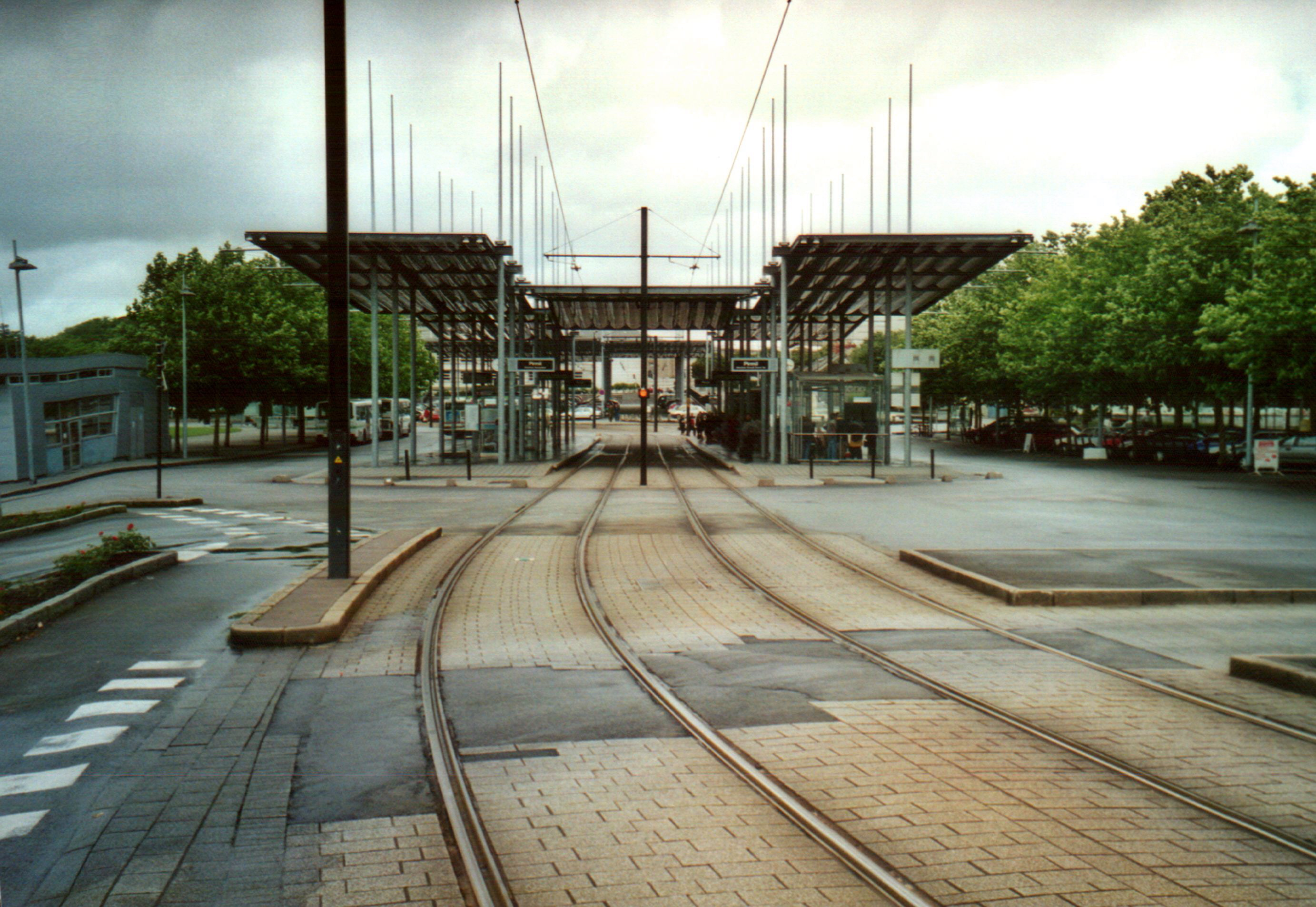 Tramway de Nantes : Station Pirmil, conçue comme un pôle intermodal